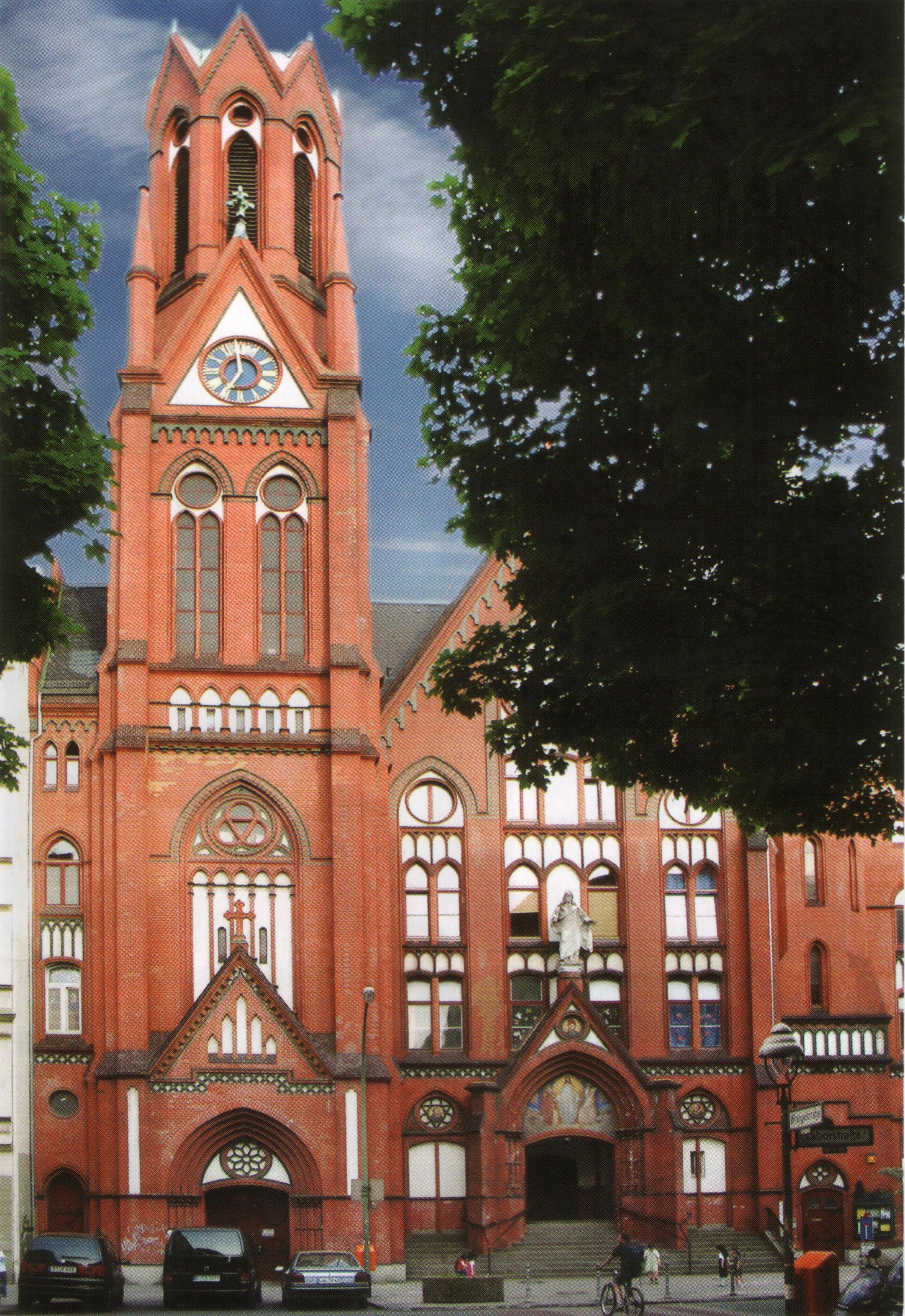 Taborkirche, wie sie heute aussieht